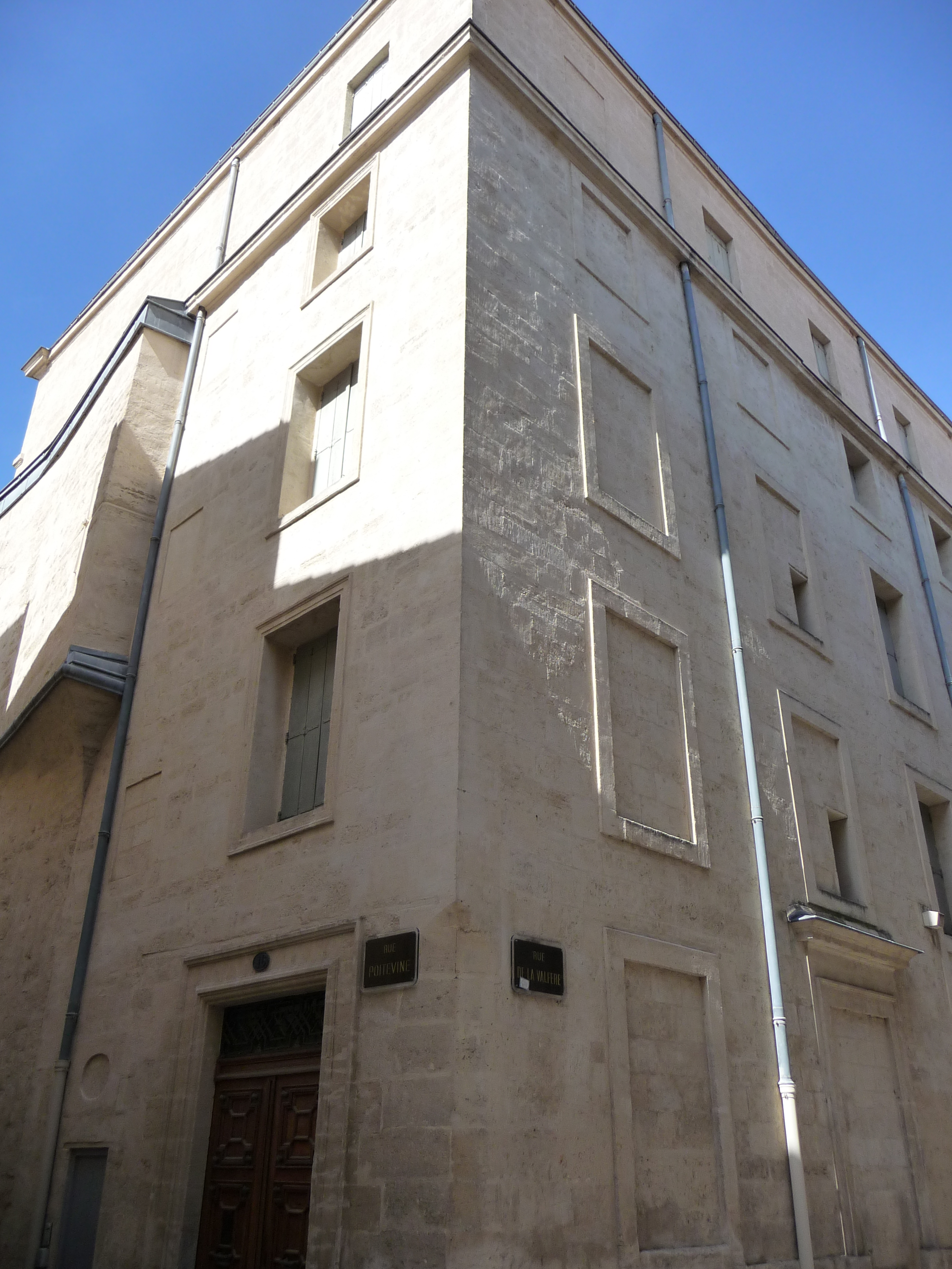 Hôtel de Lunas (Montpeller) This building is en partie classé, en partie inscrit au titre des Monuments Historiques. .